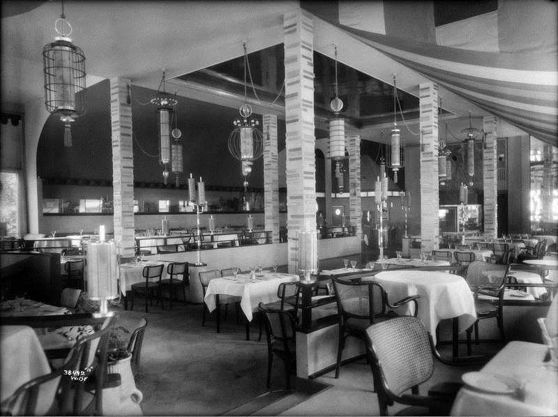 Skansen restaurant på Kontraskjæret, interiør.